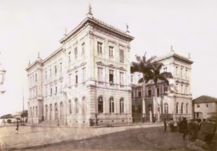 Rio de janeiro (cidade): sede do Ministério da Indústria, Viação e Obras Públicas, próximo à Praça XV.